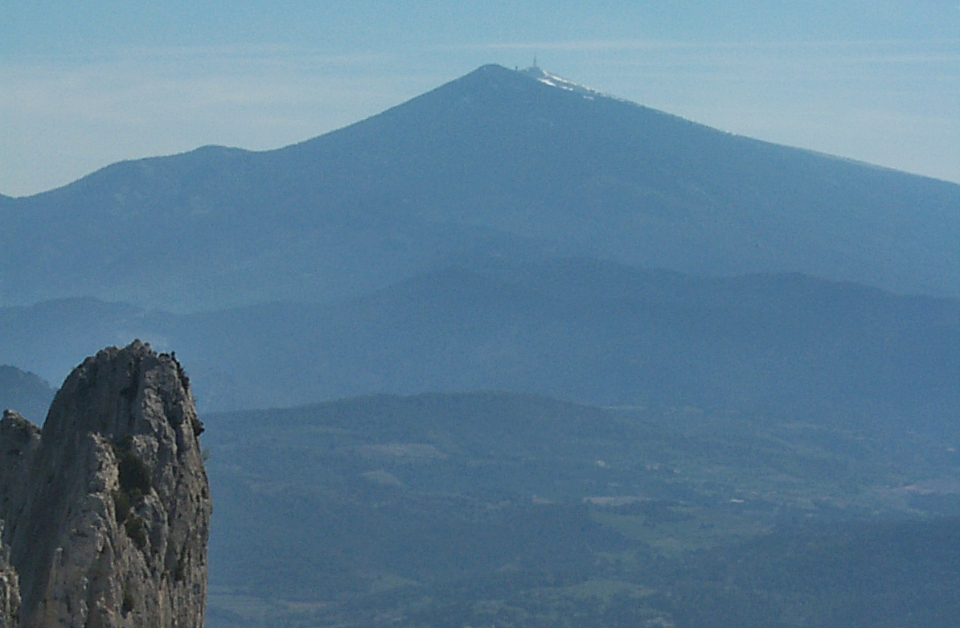 Vue gé,érale sur le Mont Ventoux